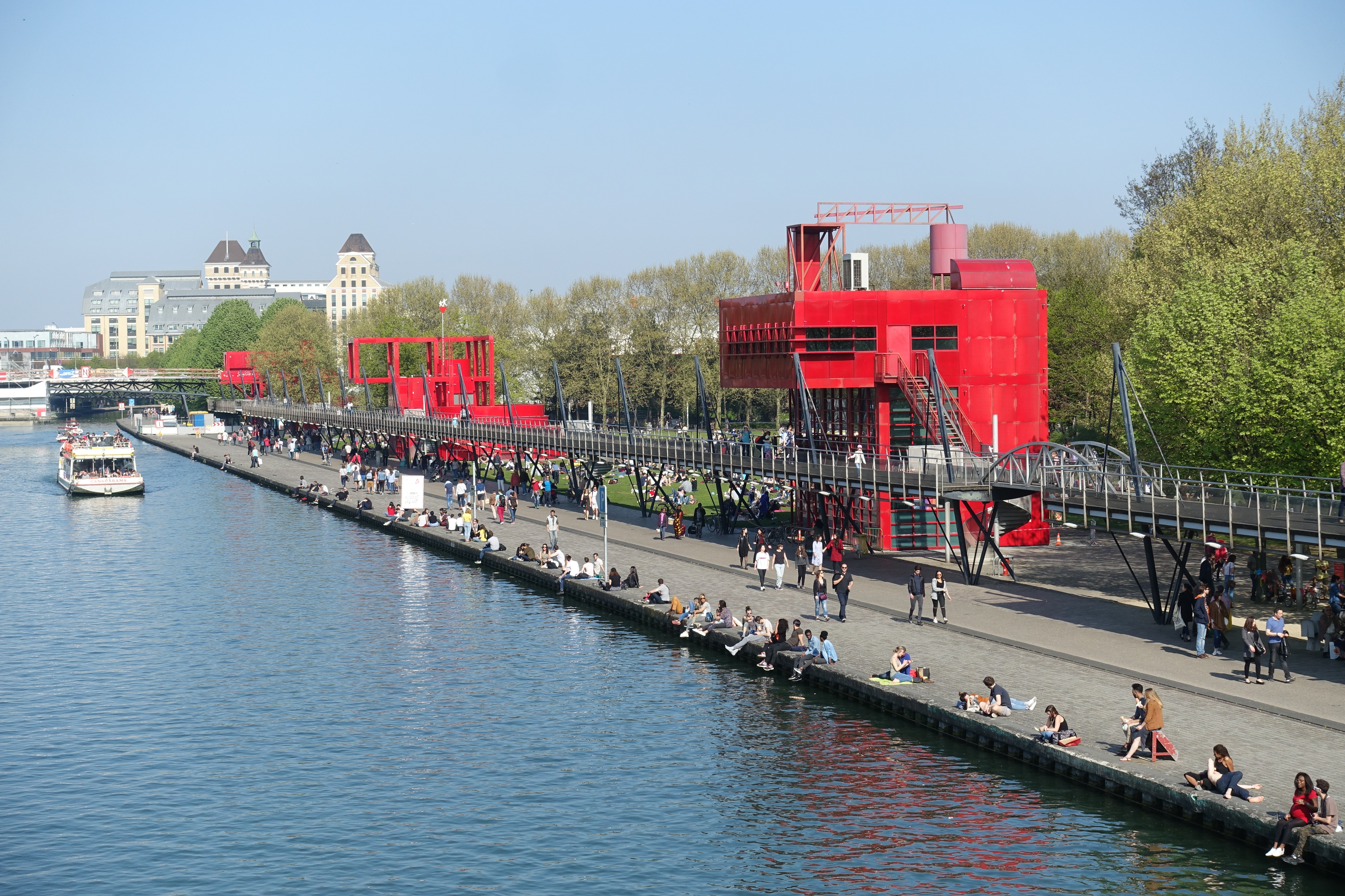 Canal @ La Villette @ Paris Parc de la Villette, Paris, France.